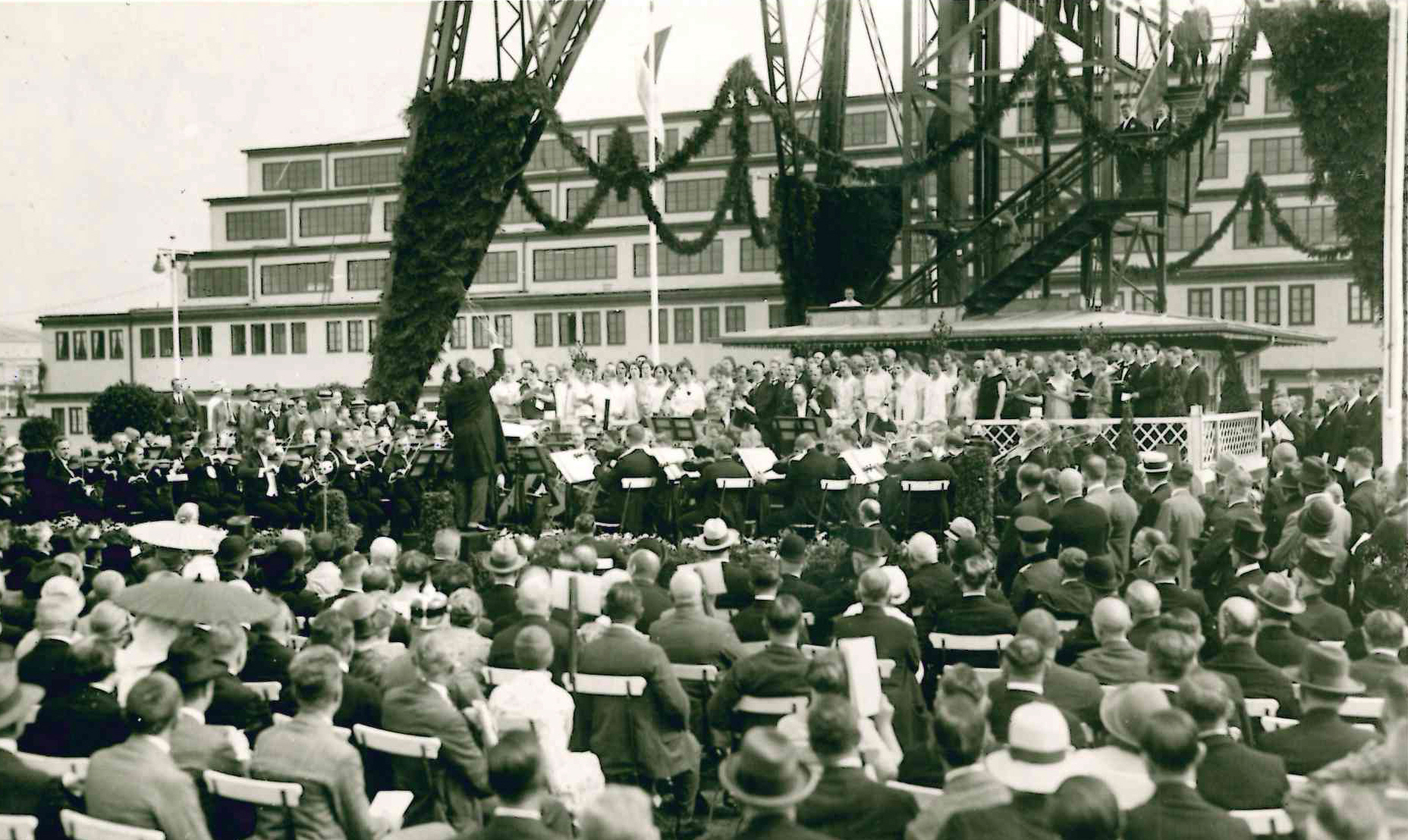 Festakt anlässlich der Einweihung des Berliner Funkturms 3. September 1926